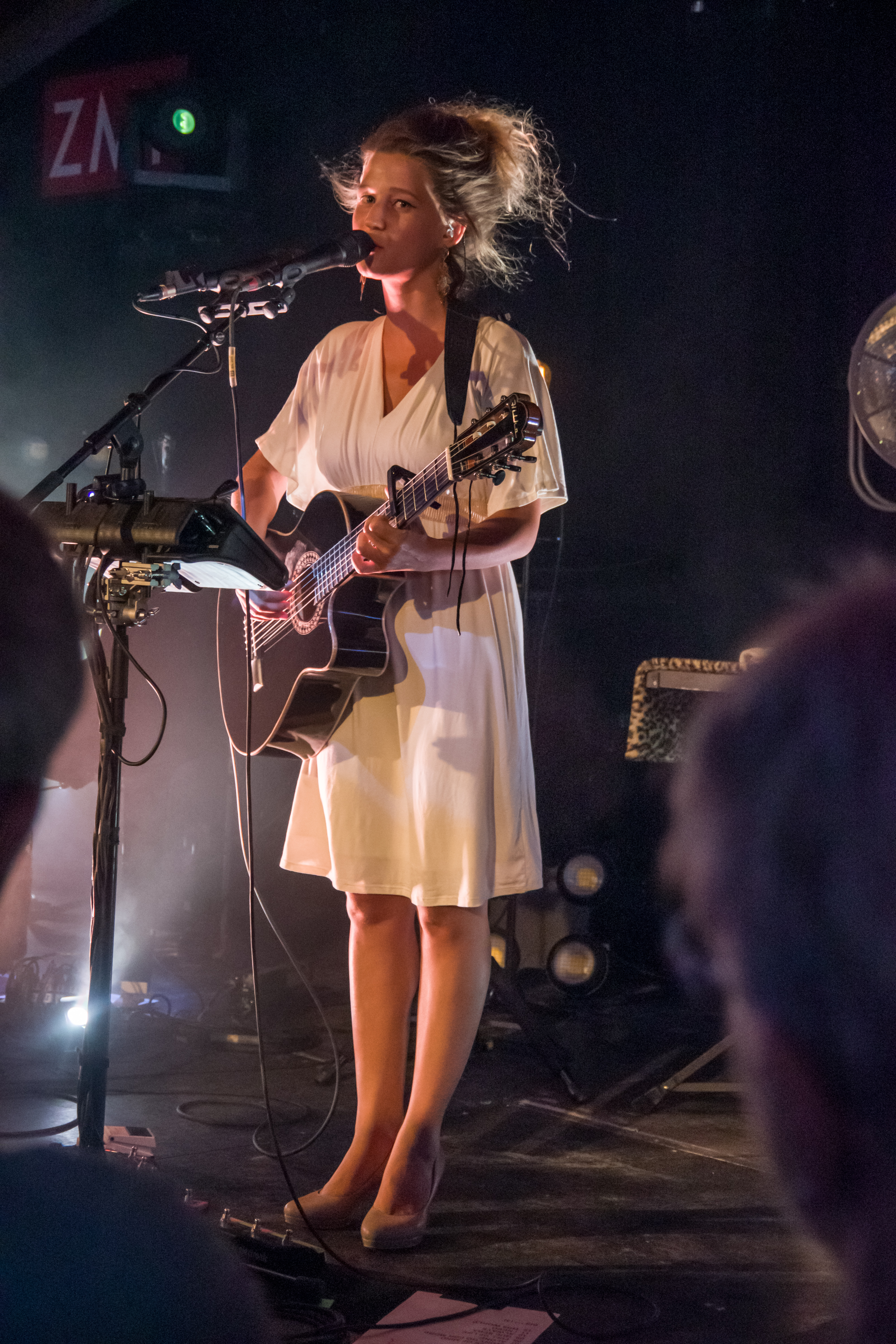 Das Zelt-Musik-Festival 2018 in Freiburg im Breisgau 26.07.2018 Selah Sue